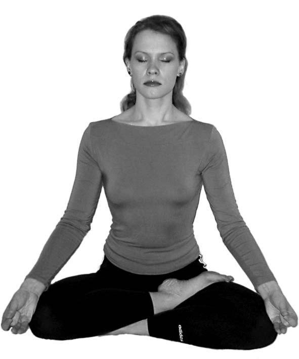 Ардхападмасана (поза полулотоса)